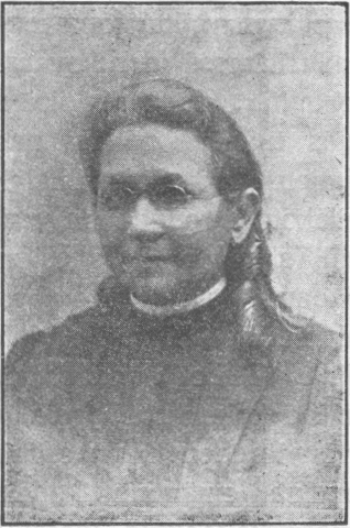 Emma Mäkinen